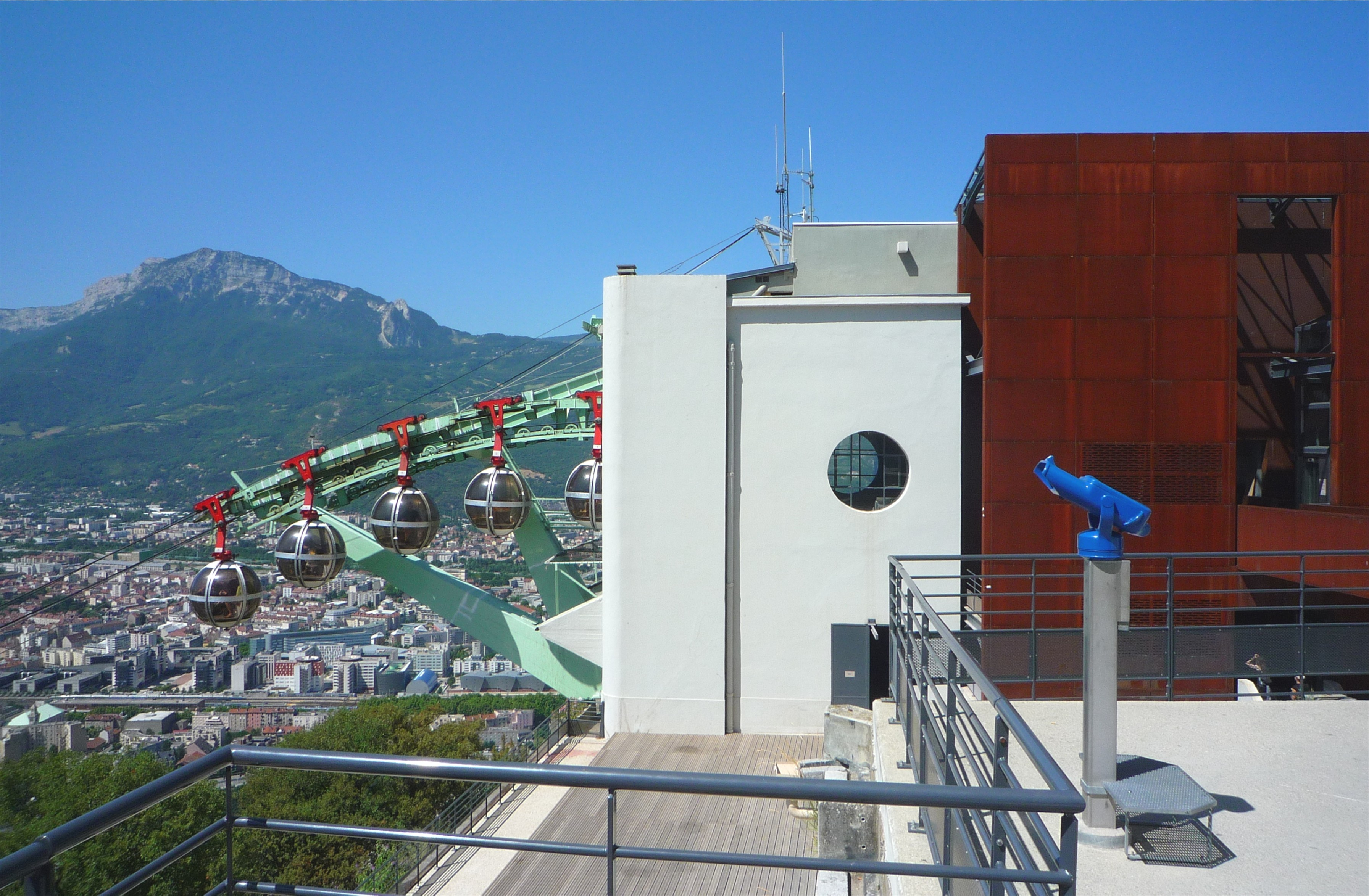 Gare d'arrivée du téléphérique de Grenoble : longueur de pente 700m.